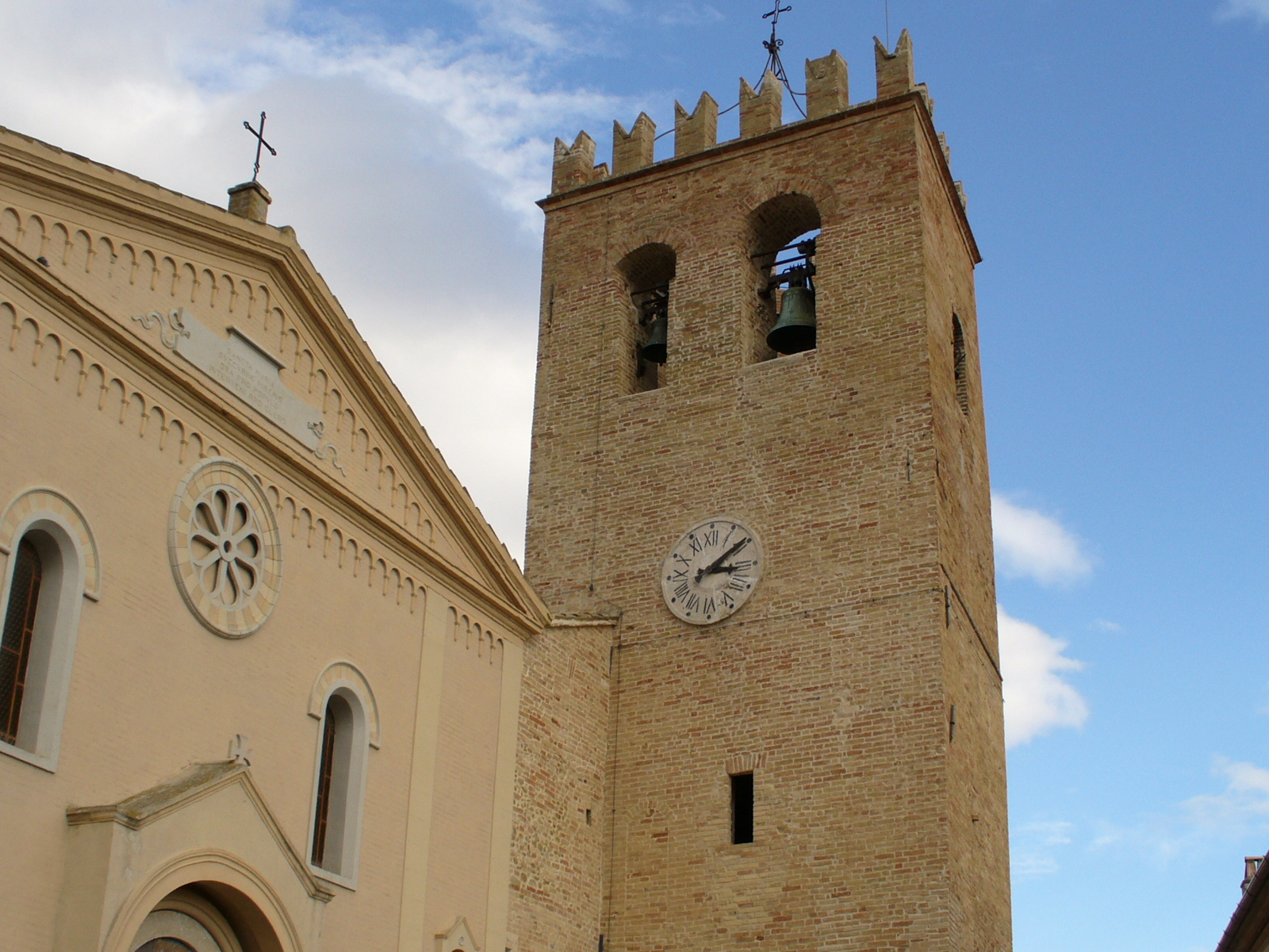 Piemontèis: La cesa e 'l ciochè.